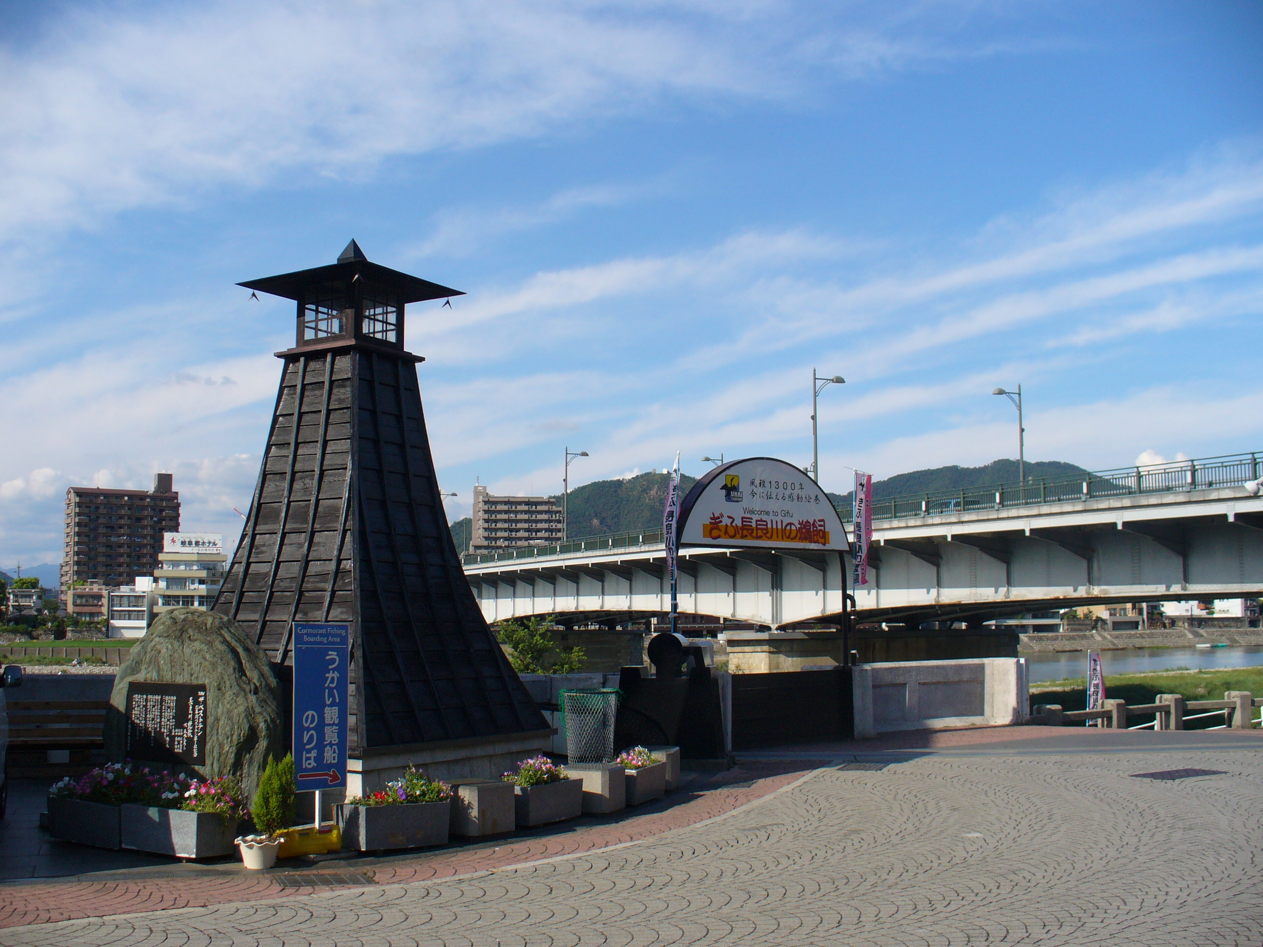 Ukai Nagaragawa（長良川鵜飼）,Gifu,Gifu(岐阜県岐阜市)で撮影。長良川鵜飼観覧船乗り場の前にある川灯台。 たもとにはあるのはw:ja:五木ひろしの「長良川艶歌」がw:ja:TBSの「ザ・ベストテン」で「12年間ベストテン第1位」を獲得した時の記念碑。後方はw:ja:長良橋。